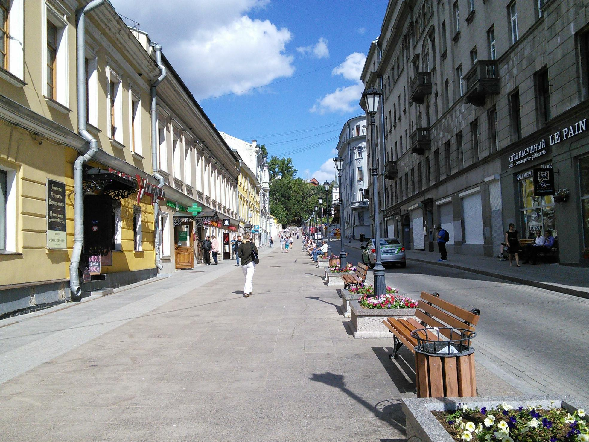 Улица Забелина, Москва